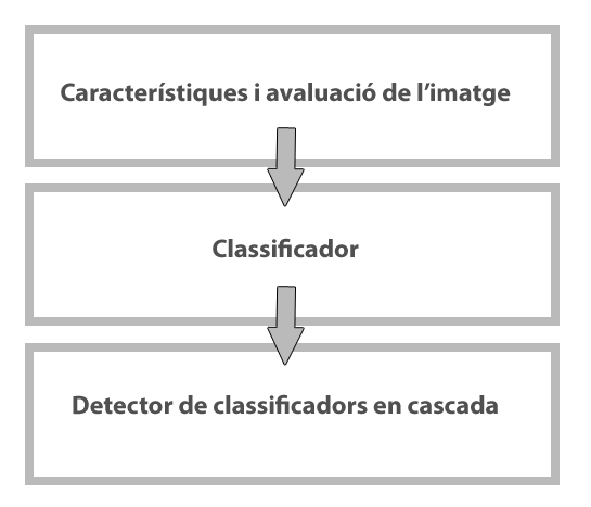 Esquema Viola Jones